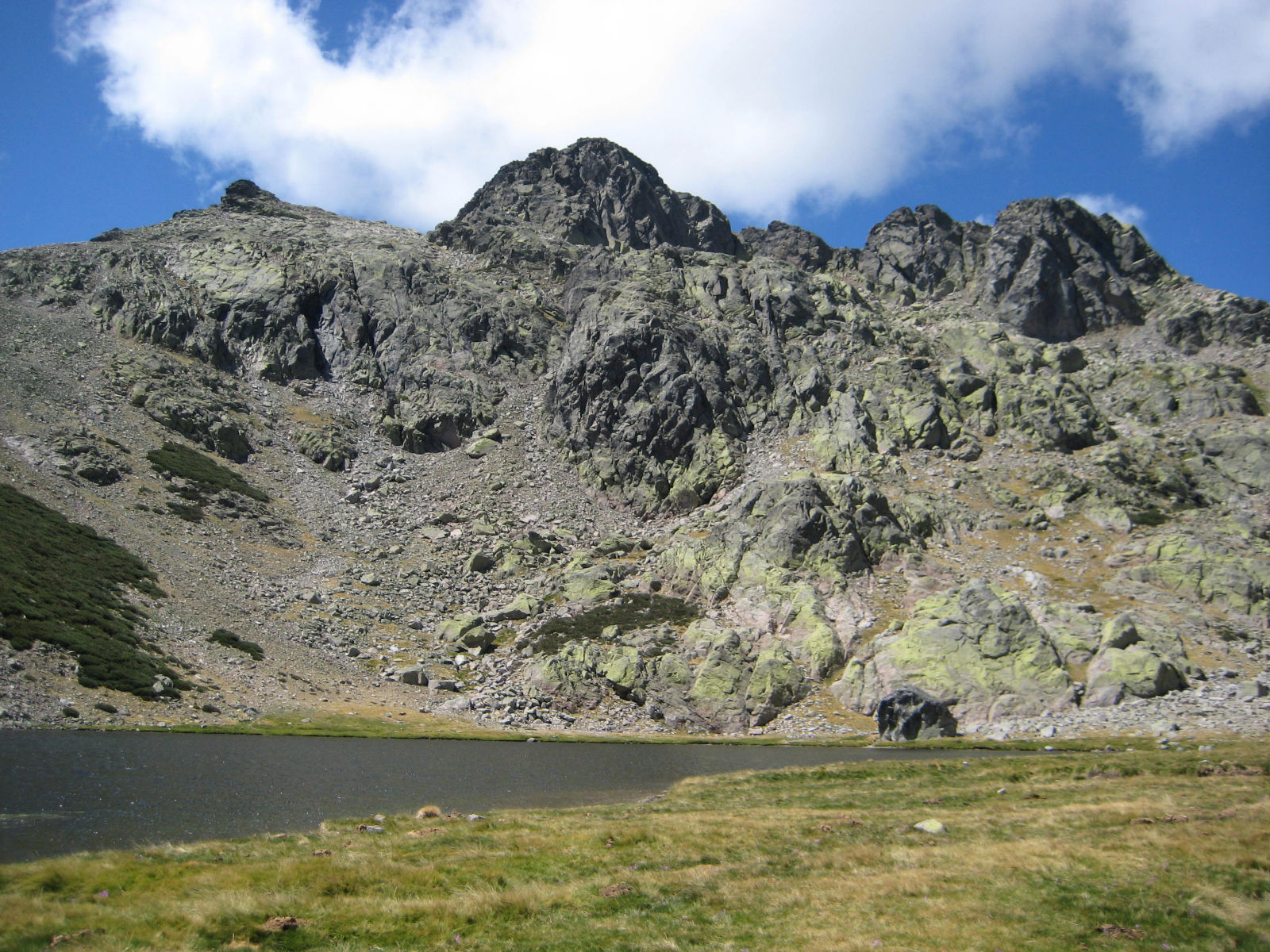 Imagen de la Laguna y Circo de la Garganta de los Caballeros en el término municipal de Navalonguilla (Ávila). Al fondo se muestran entre otros el pico de La Covacha.